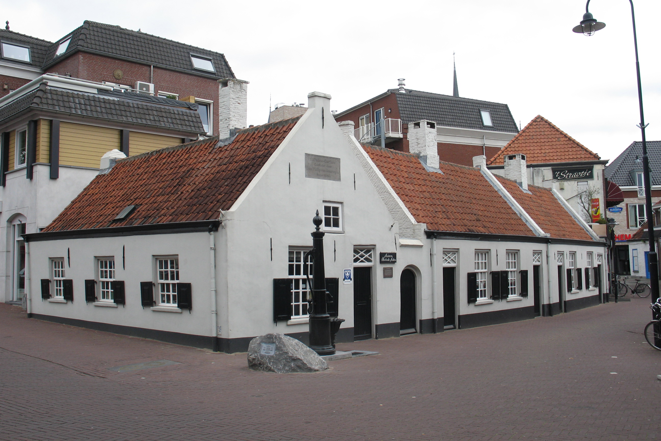 St. Paulusgasthuis